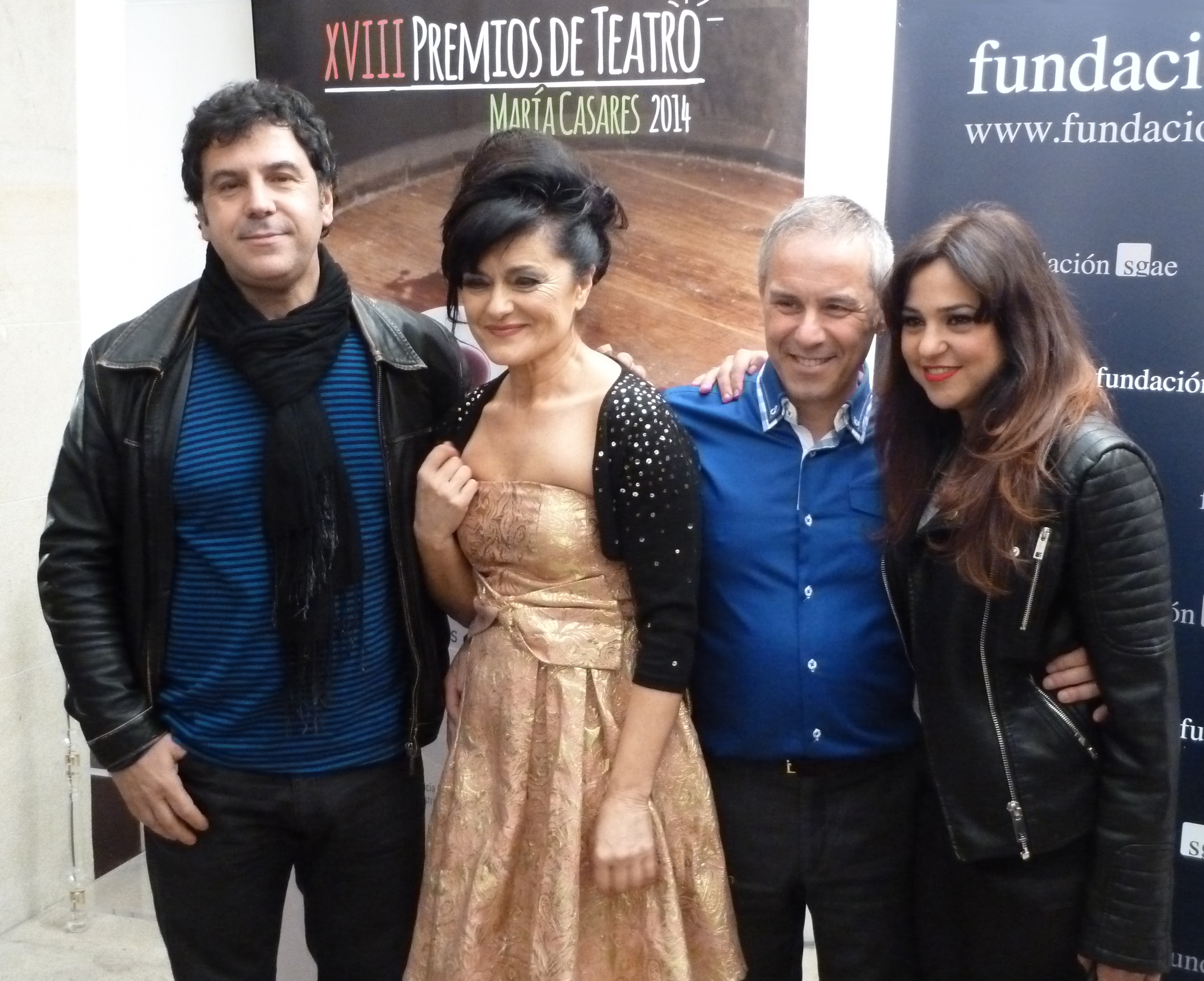 Víctor Mosqueira, María Costas, Avelino González na gala dos premios María Casares 2014.